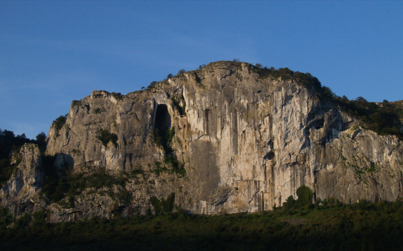 Mont Araotz près d'Oñati